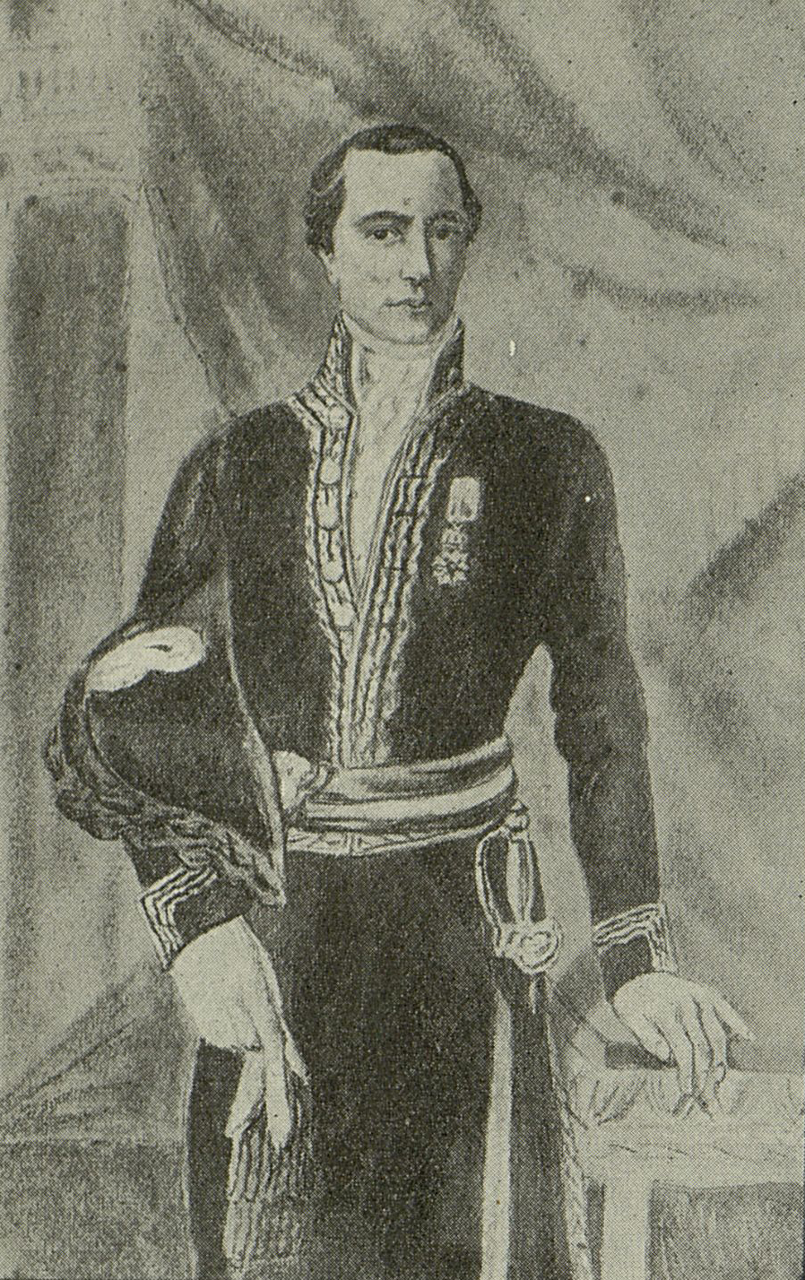 Jean Cabanis, maire de Toulouse entre 1845 et 1846.